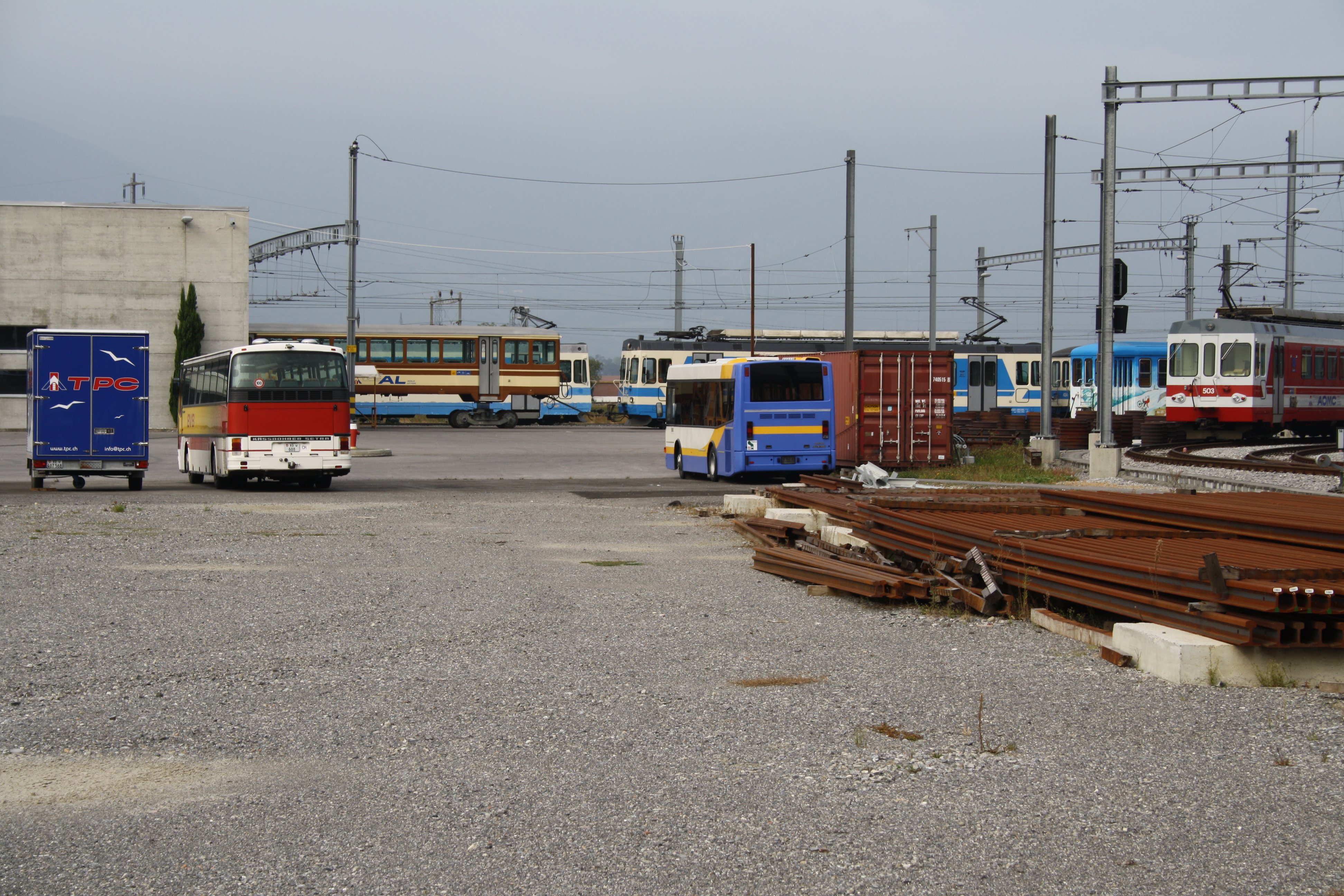 Bahnen und Busse im Dépôt Aigle